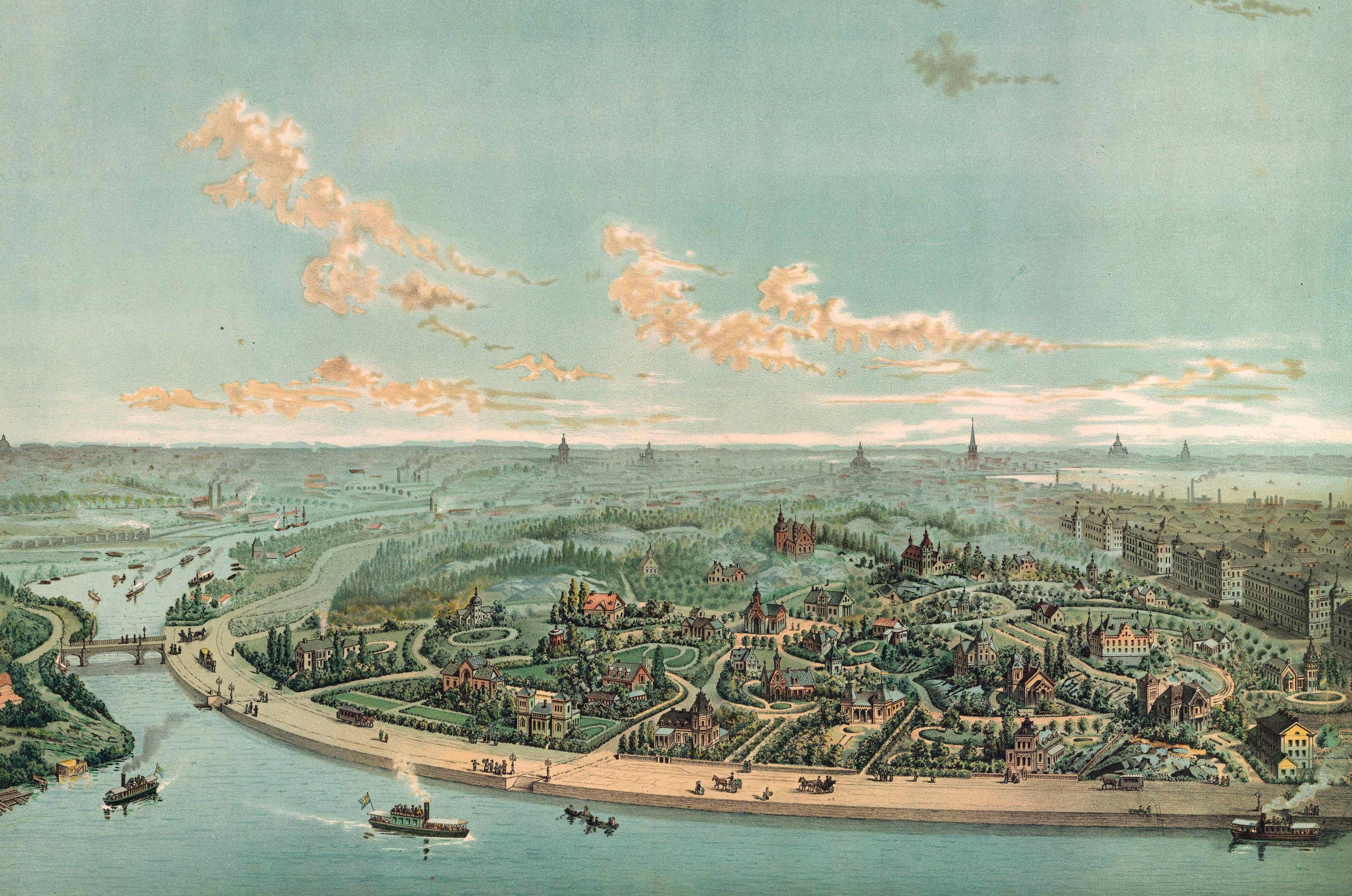 Prospekt till villastad å Hornsberg vid Kungsholmens nordvästra del.